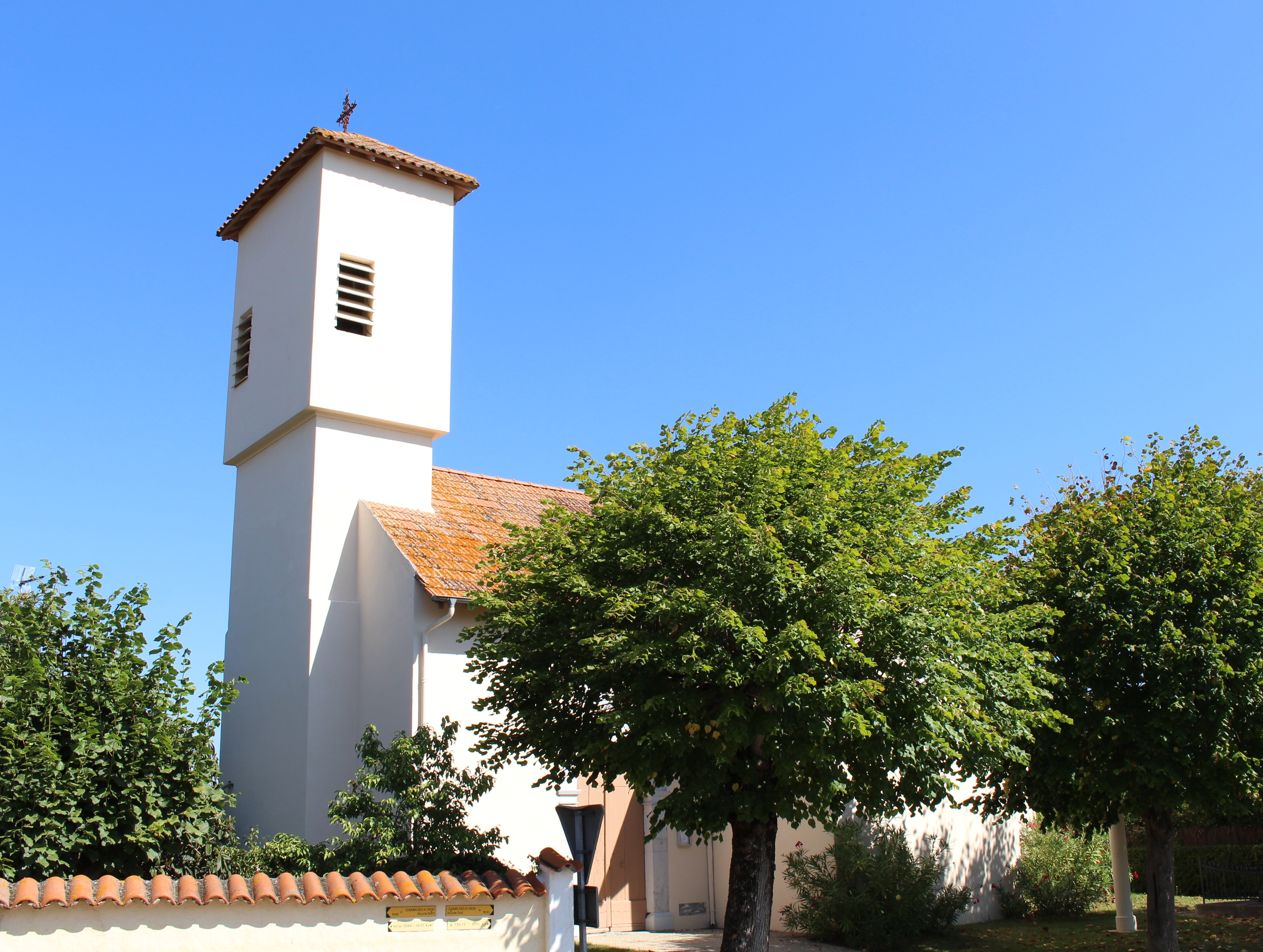 Église Saint-Jean-Baptiste d'Escondeaux (Hautes-Pyrénées)